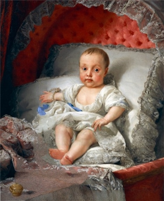 Infanta Carlota Joaquina of Bourbon (1775-1830)